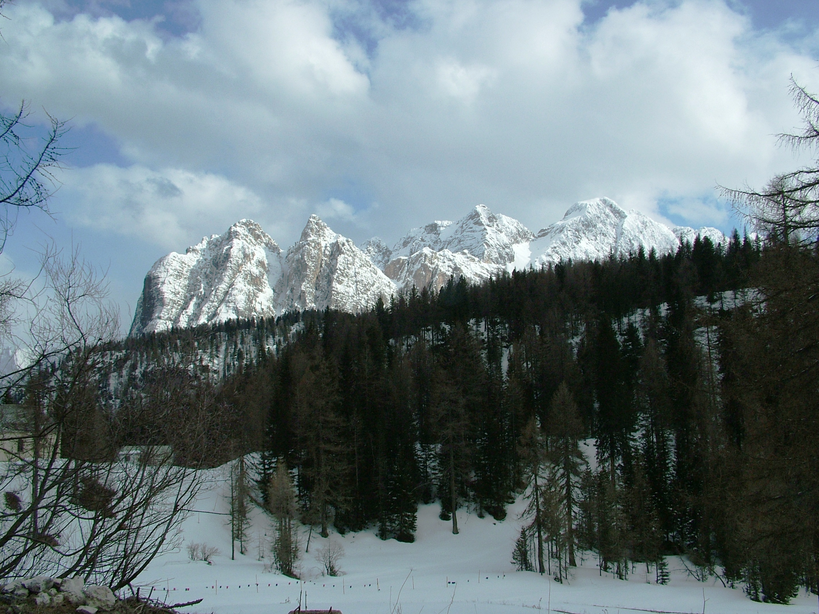 Passo Tre Croci télen (Sorapis-csoport), Olaszország